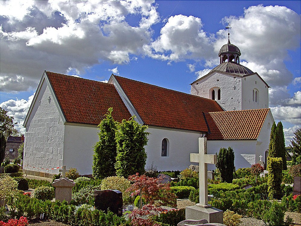 fra nordøst